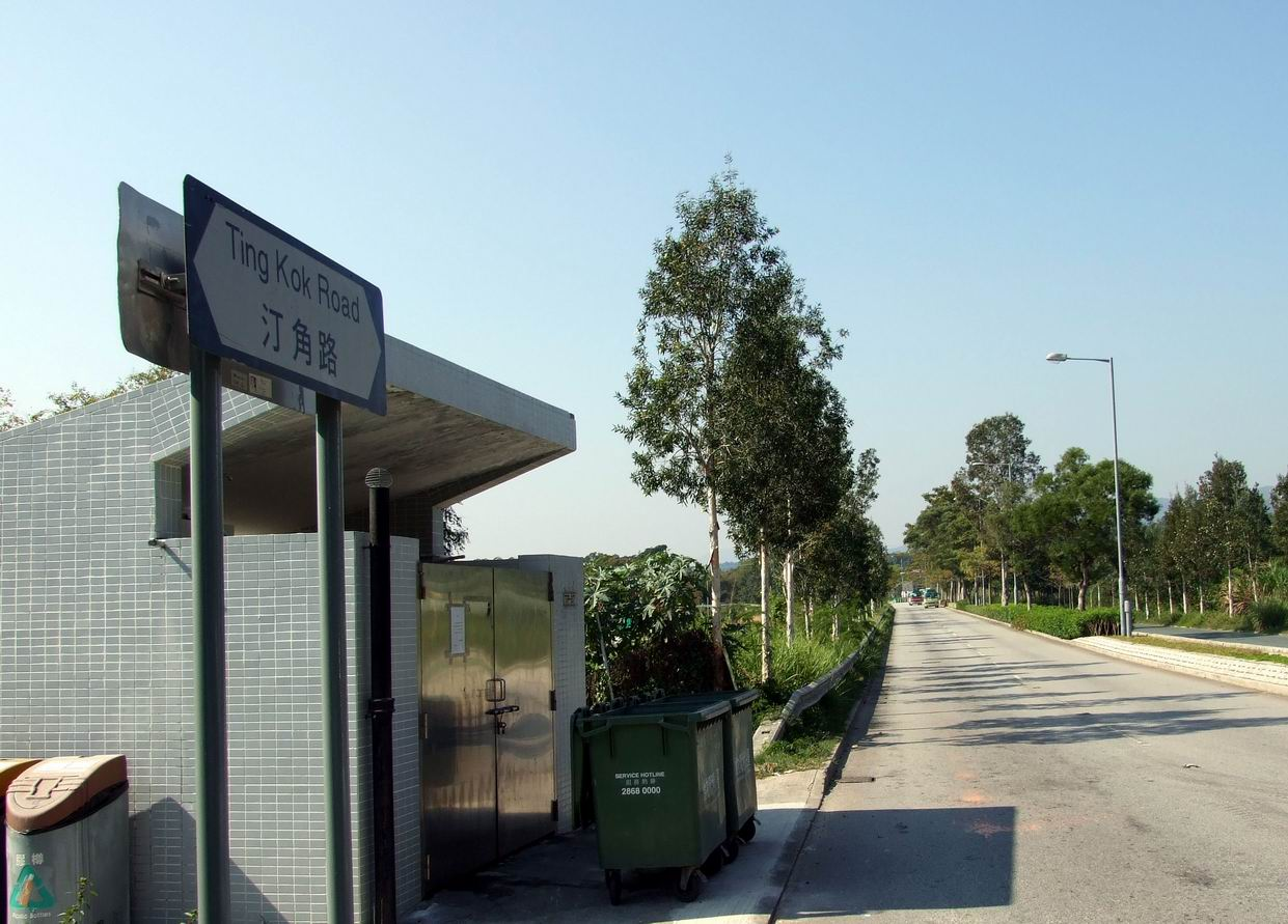 汀角路近大尾篤